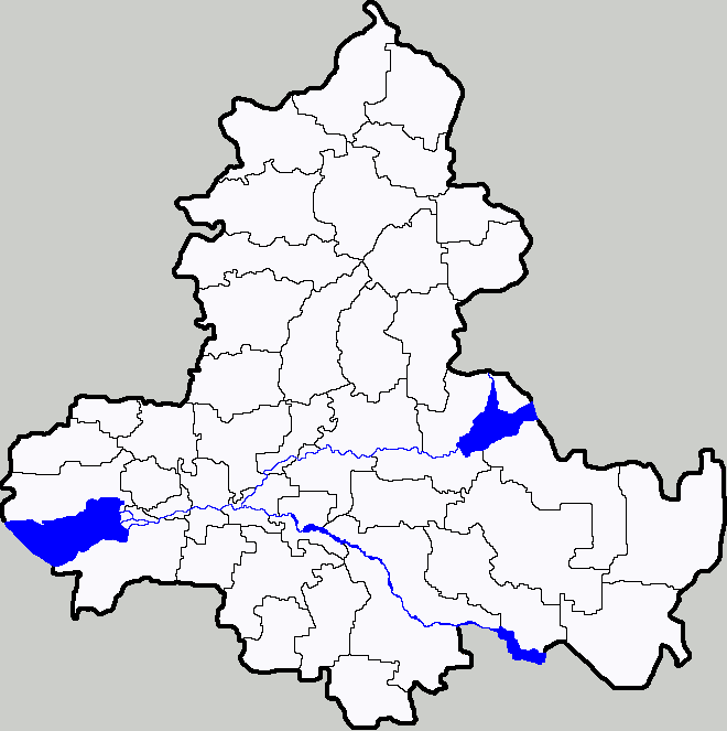 Позиционная карта Ростовской области